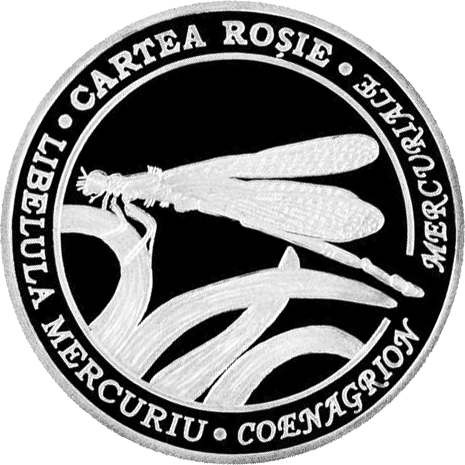 Реверс памятной монеты "Стрелка южная"